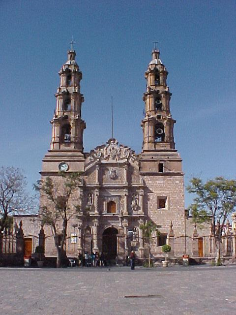 Catedral de la ciudad de Aguascalientes (Cathedral of Aguascalientes City)